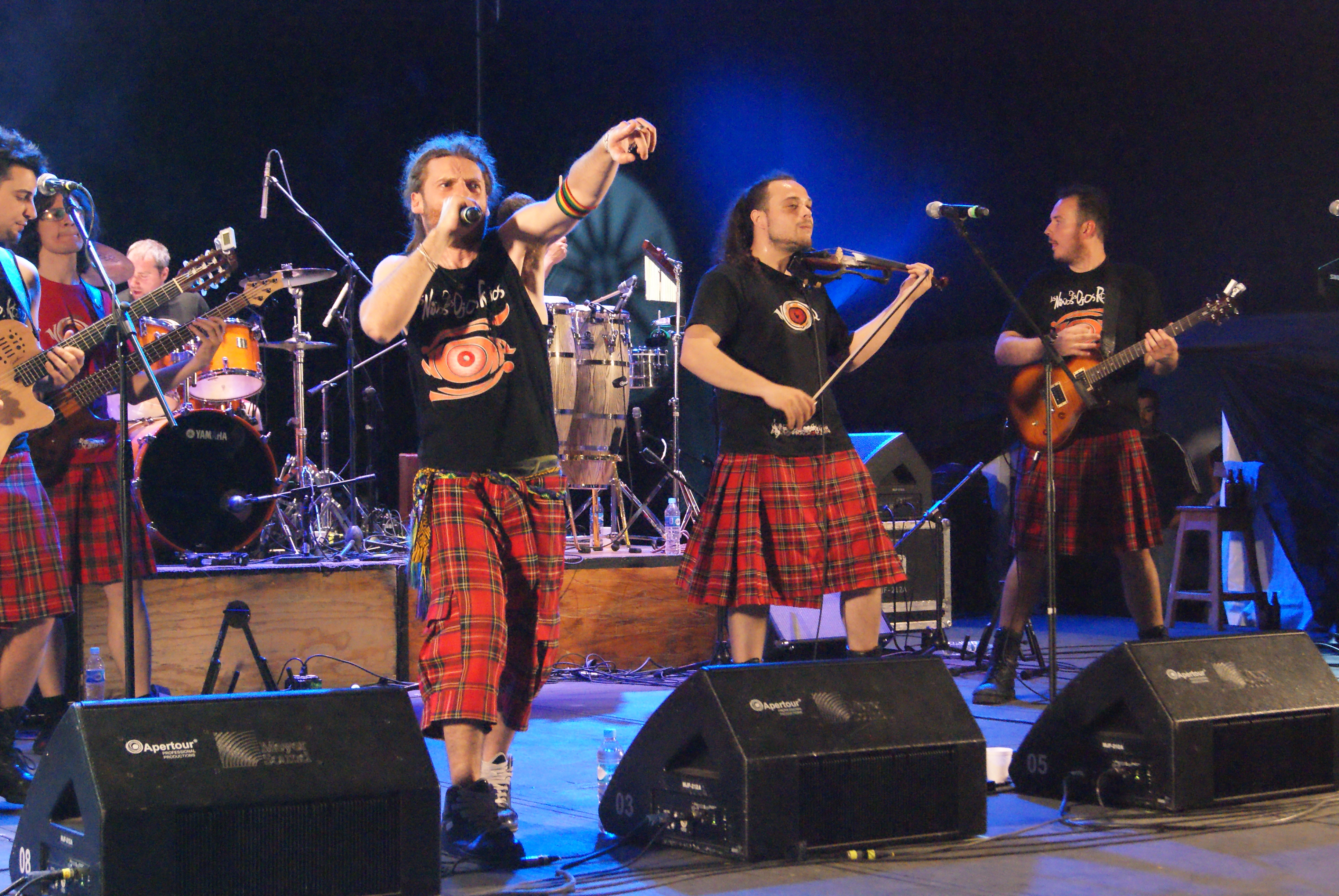 Los Niños de los Ojos Rojos en un concierto en el Zócalo de Puebla, durante el Festival Barroquísimo, 2010